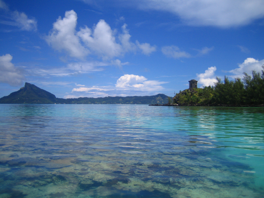 Blick auf Mangareva (links) und Aukena (rechts), Gambierinseln, Französisch-Polynesien